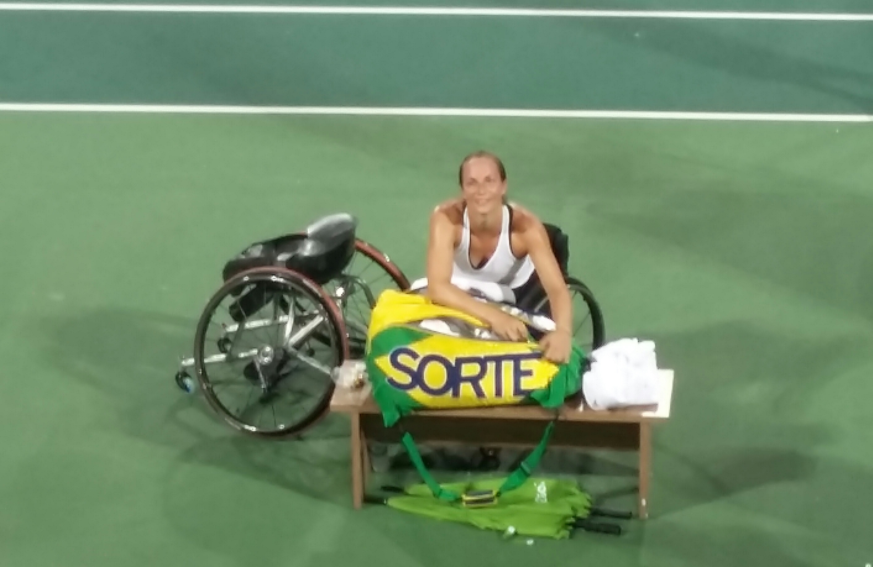 GRIFFIOEN Jiske Tênis em Cadeira de Rodas Países Baixos olhando para seus familiares que estão na arquibancada.